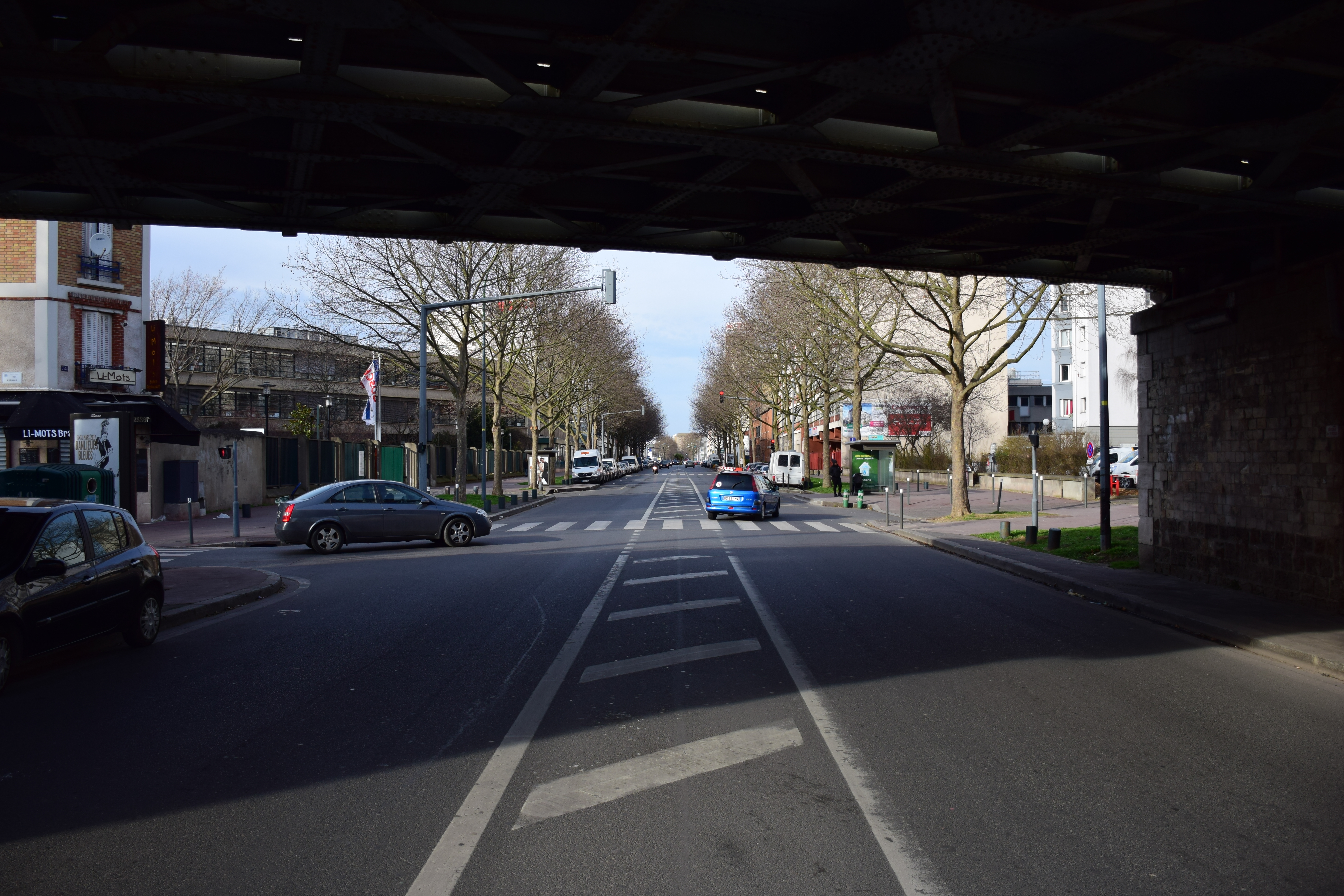 Avenue Michelet (Saint-Ouen, France), vue vers le nord, depuis le tunnel au sud de l'intersection avec la rue Godillot.